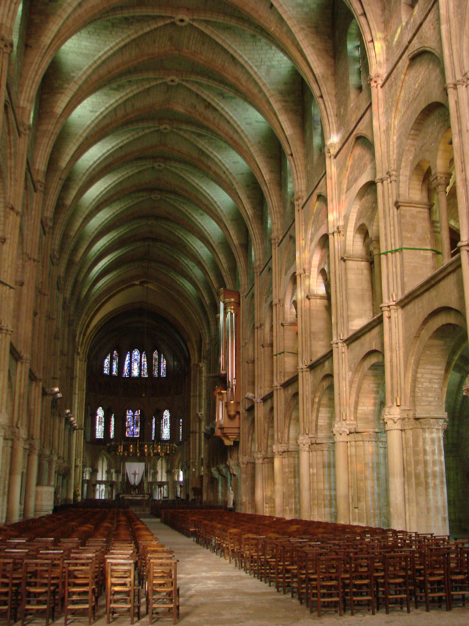 Nef de la basilique Saint Remi à Reims (XIème siècle).